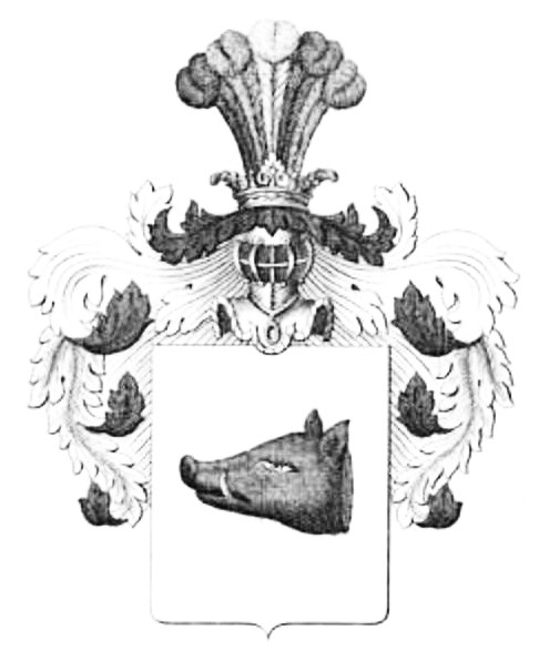 Wappen der von Grambow, altes mecklenburg-brandenburgisches Adelsgeschlecht.